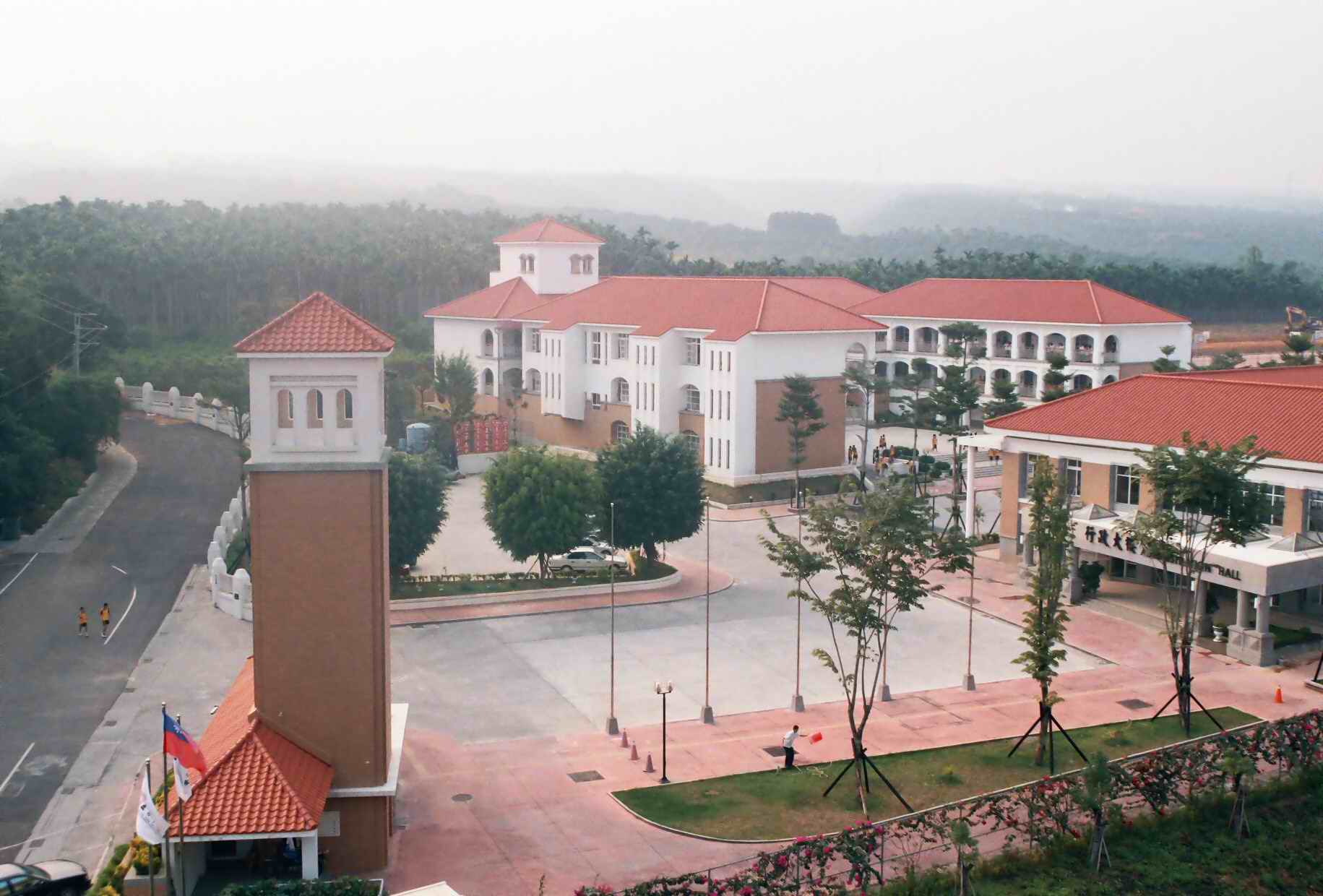 南投市五育高級中學校園一隅。